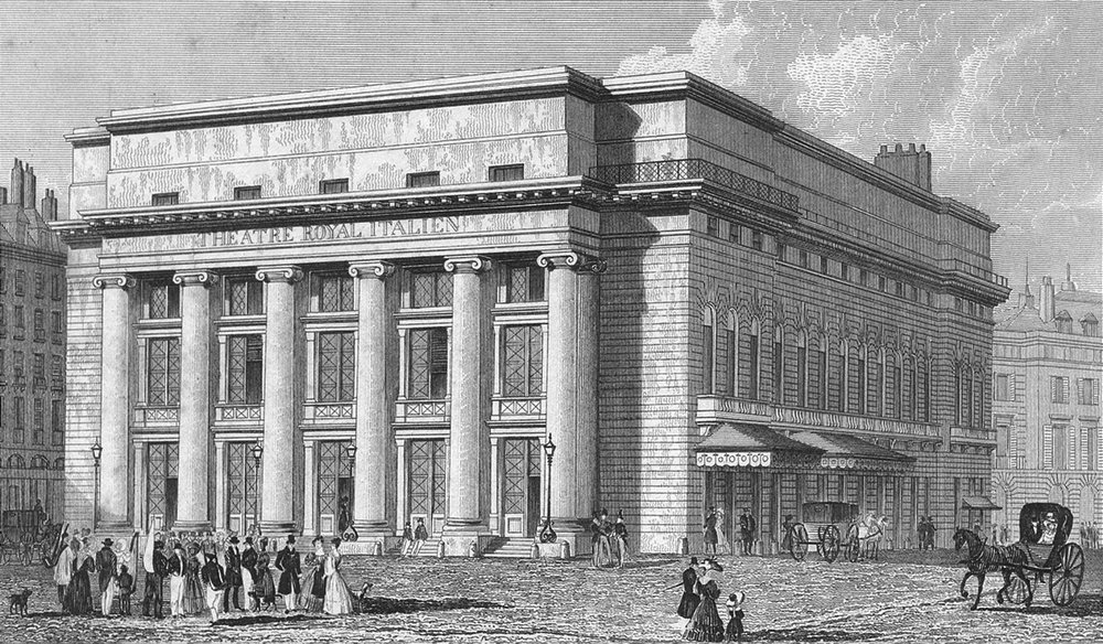 Première salle Favart, bâtiment édifié d'après les plans de Jean-François Heurtier en 1783 et détruit par un incendie en 1838